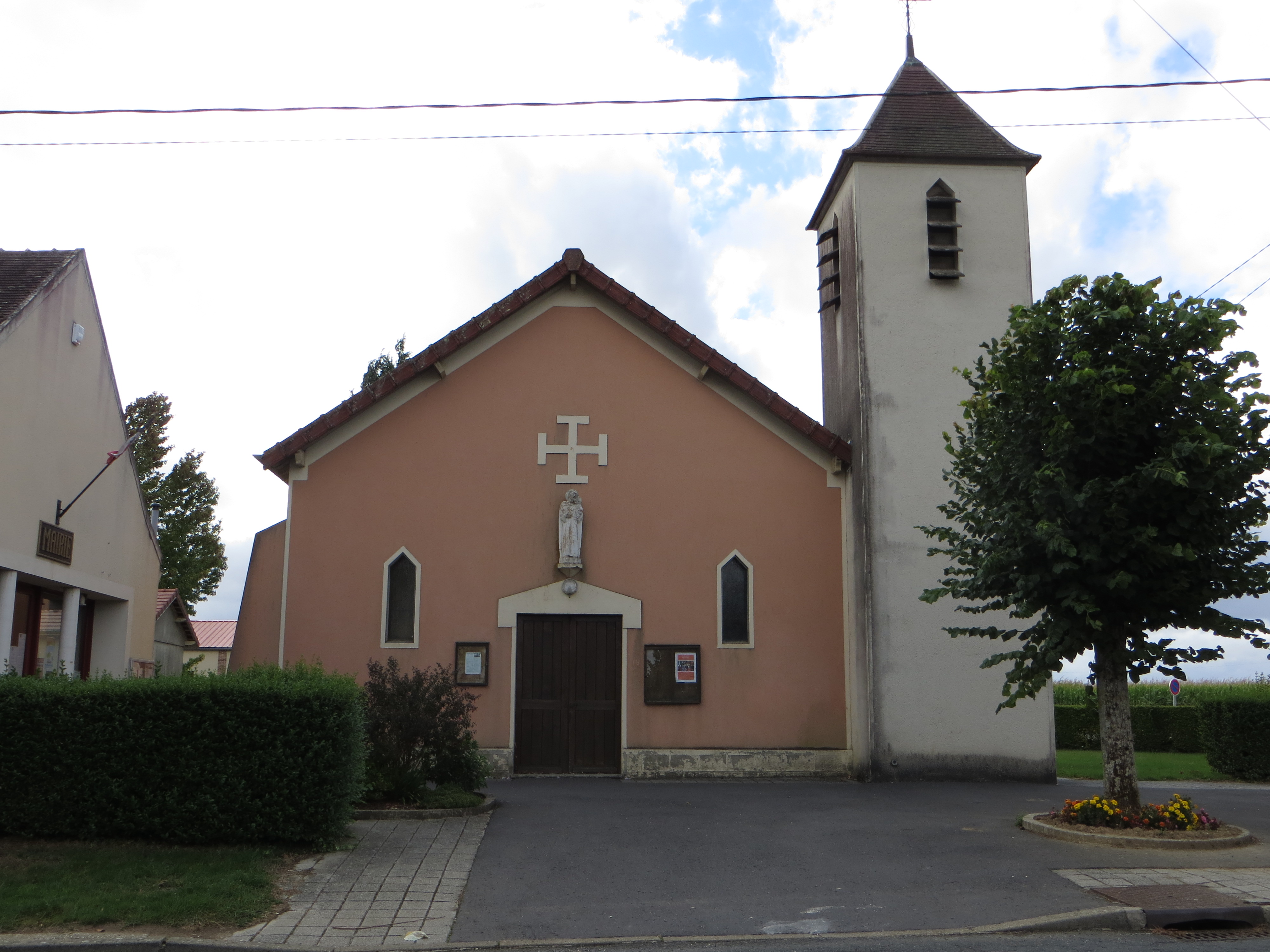 Vue de l'église